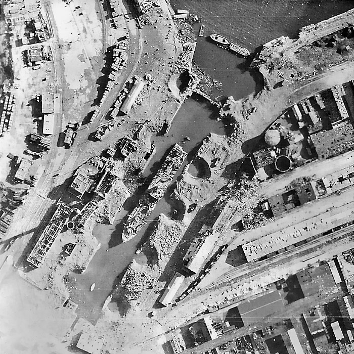 Sabotage par les allemands lors du siège de Brest pour rendre les infrastructures portuaires inutilisables par les alliés - Fin août 1944